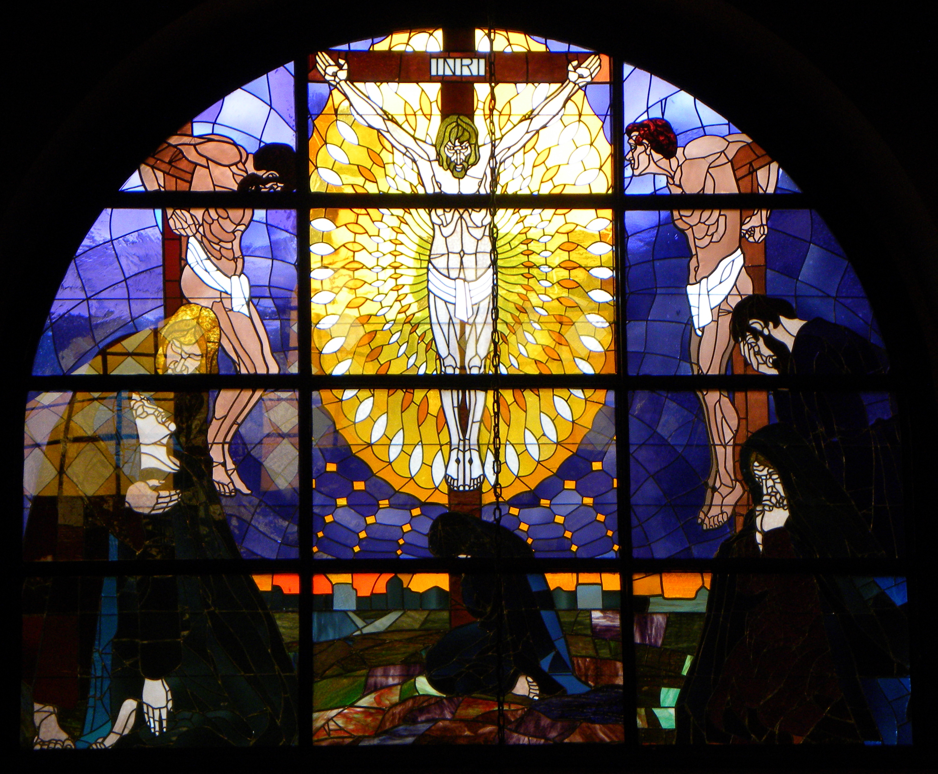 Witraz przedstawiający Ukrzyzowanie w katedrze w Bielsku-Białej